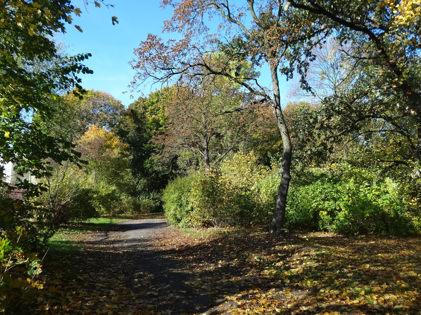 Park na Wzgórzu Wolności w Bydgoszczy